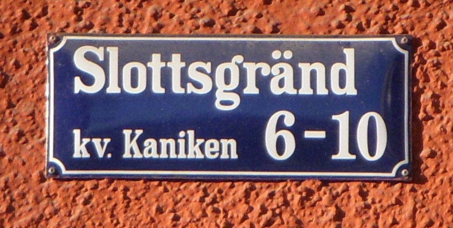 Gatuskylt för Slottsgränd 6-10 (Kvarteret Kaniken) i Uppsala.